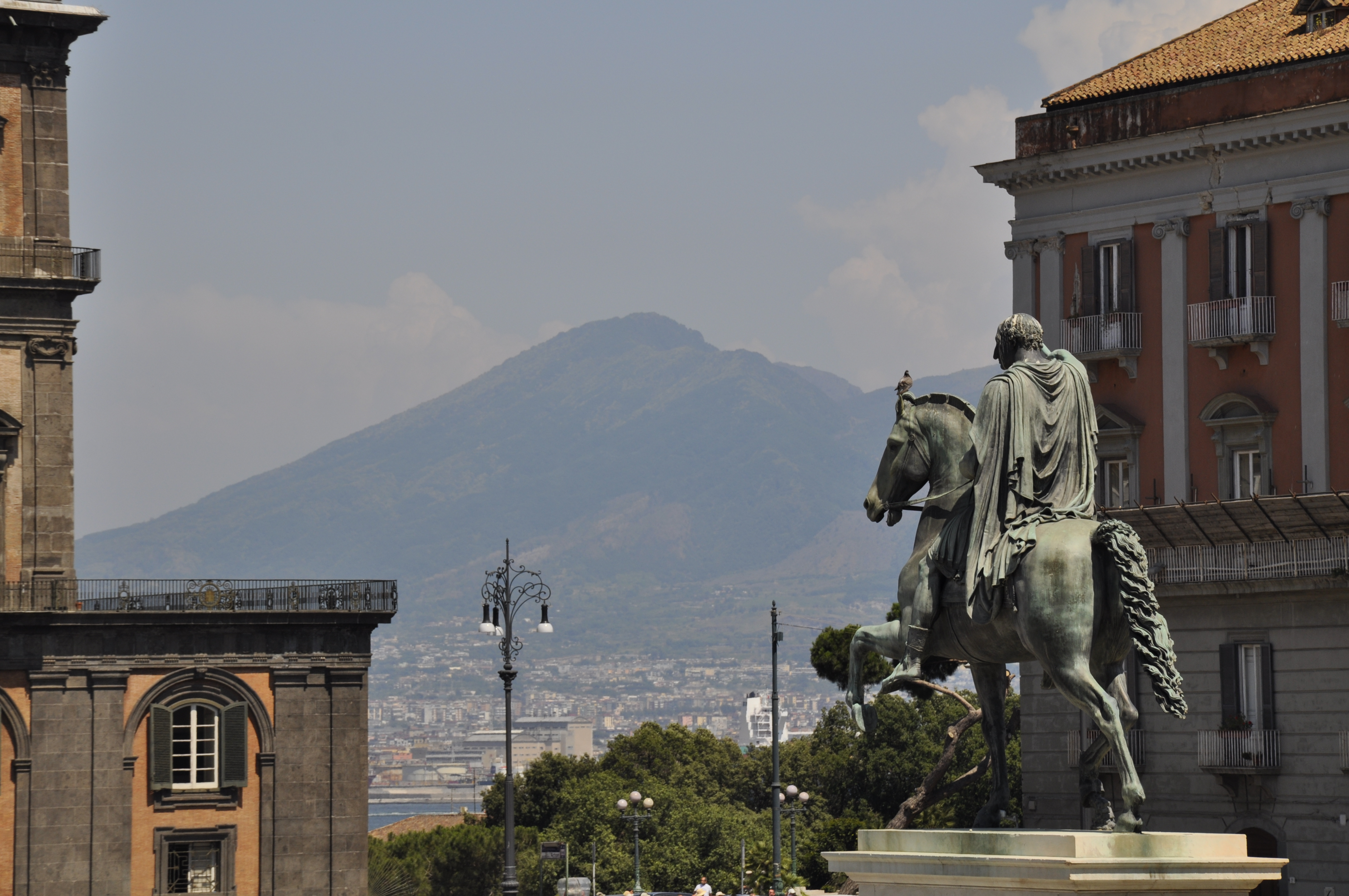 Pohled na Vesuv z náměstí Piazza del Plebiscito, Neapol